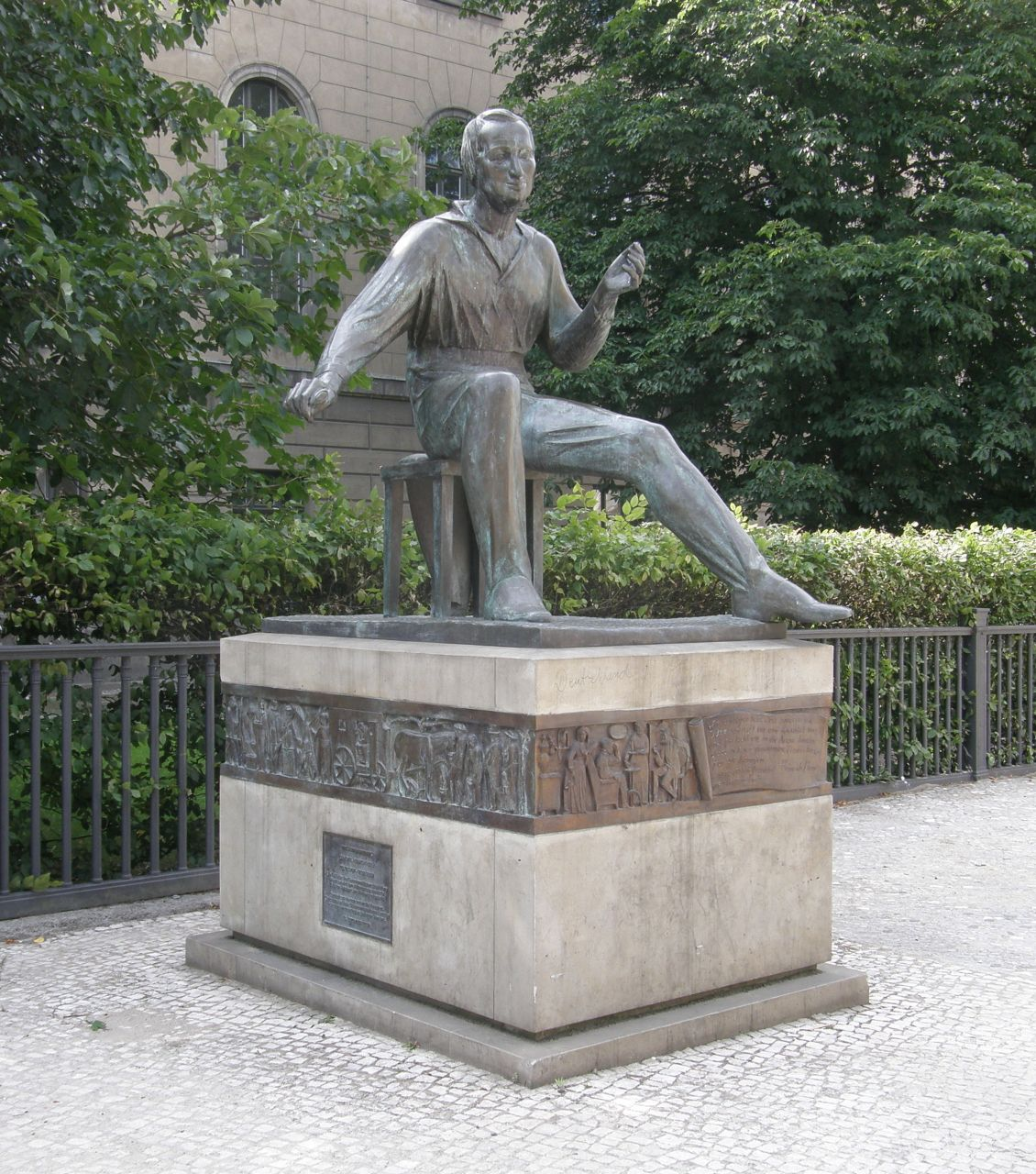 Waldemar Grzimek: Heinrich-Heine-Denkmal II. 1954-56, Abguss von 2002, Bronze. Unter den Linden, neben der Neuen Wache, Berlin-Mitte.